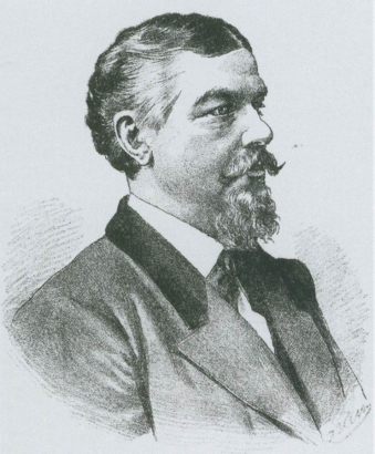 Gustav Meretta